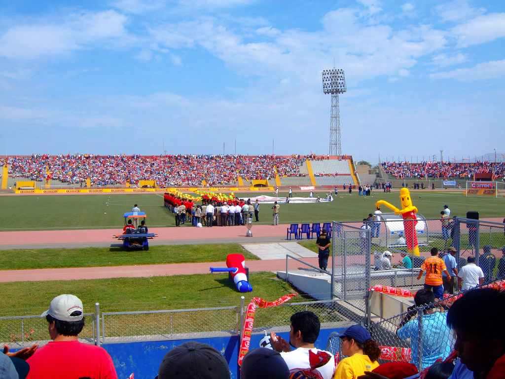 ESTADIO ELIAS AGUIRRE DE CHICLAYO